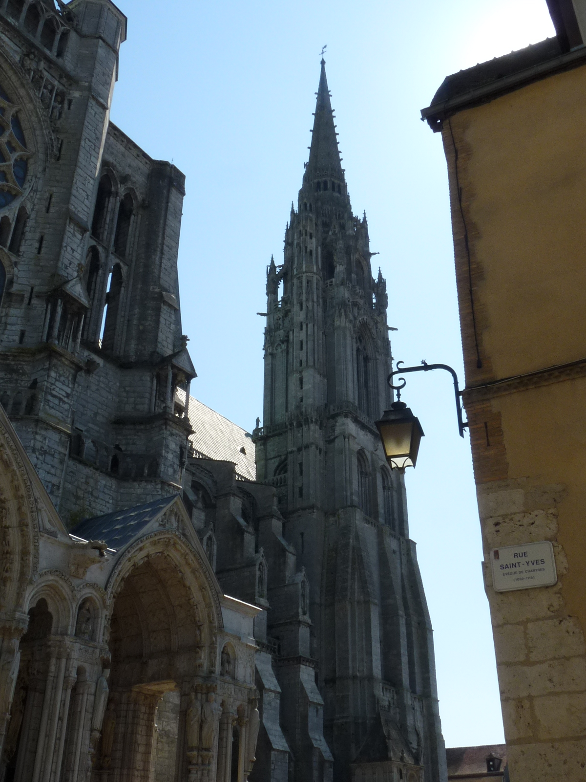 Ref MH PA00096993 Flèche nord de la cathédrale de Chartres, dans le style gothique flamboyant. Tour dite du clocher neuf initialement construite entre 1134 et 1150, puis reconstruite par Jehan de Beauce de 1507 à 1513. Haute de 115,18m, elle fait partie des plus hautes flèches de France.